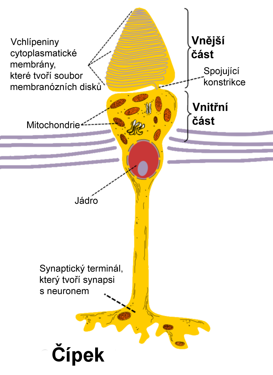 Stavba čípku